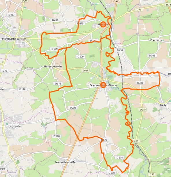 Carte de la commune nouvelle et de ses communes déléguées